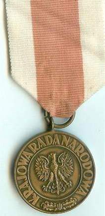 Medal Zwycięstwa i Wolności 1945 (Victory and Freedom 1945 Medal)